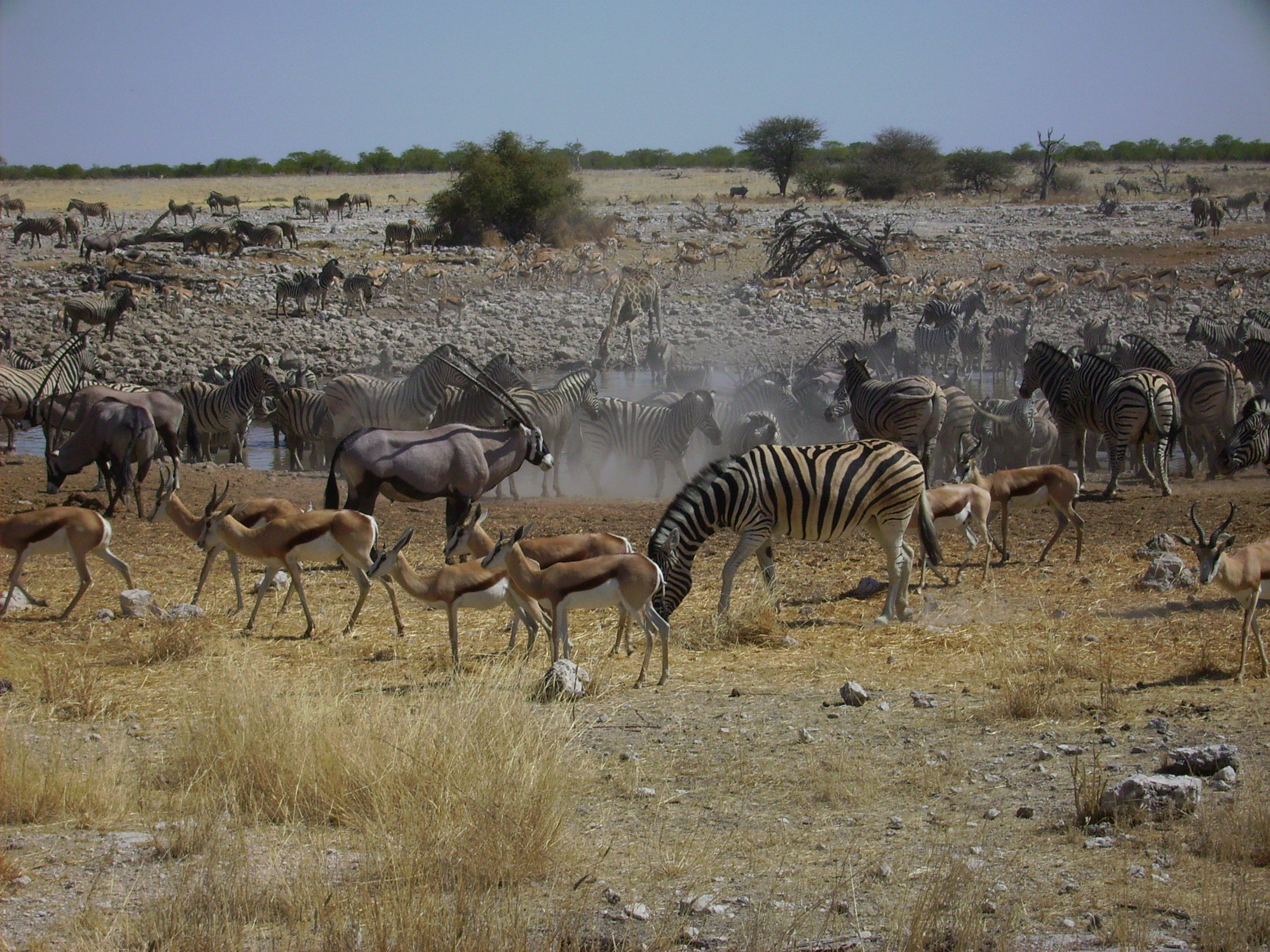 Etosha National Park, Okaukuejo waterhole